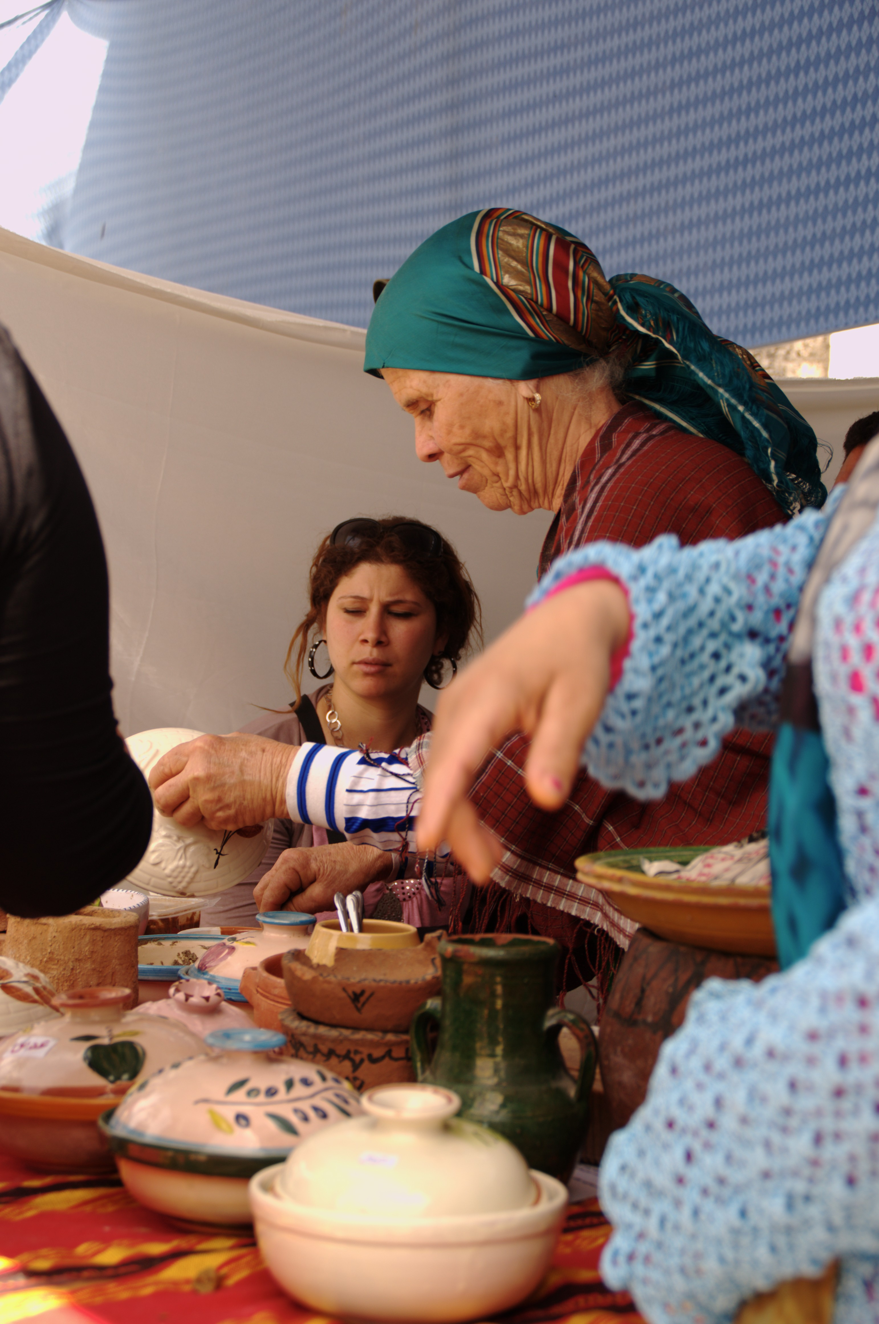 Une femme en habit traditionnel de la région de Lamta, prépare de la bsissa pendant la foire du festival de la bsissa